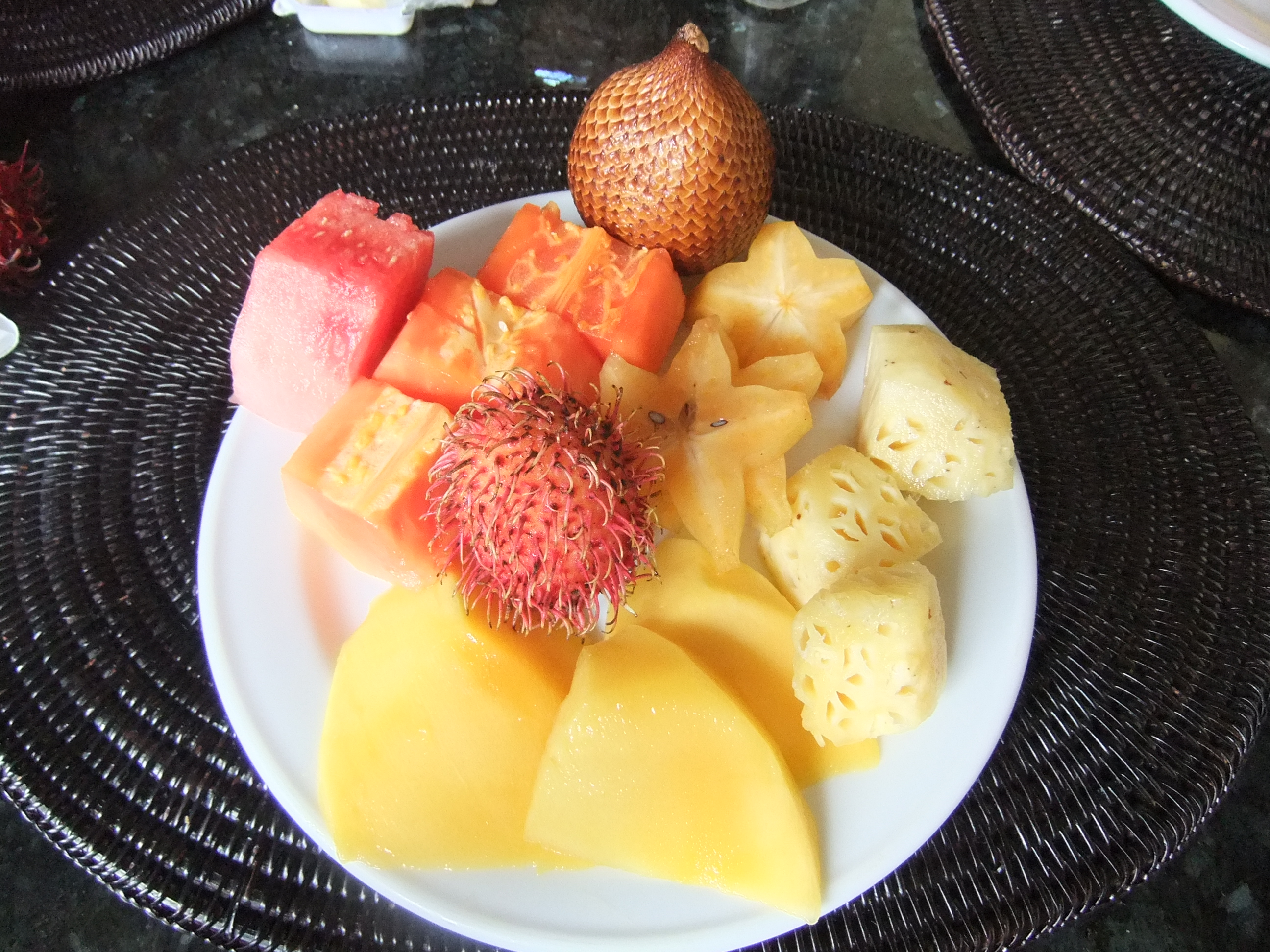 Mixed fruits in Bali, mango, Salak Bali, rambutan, starfruit